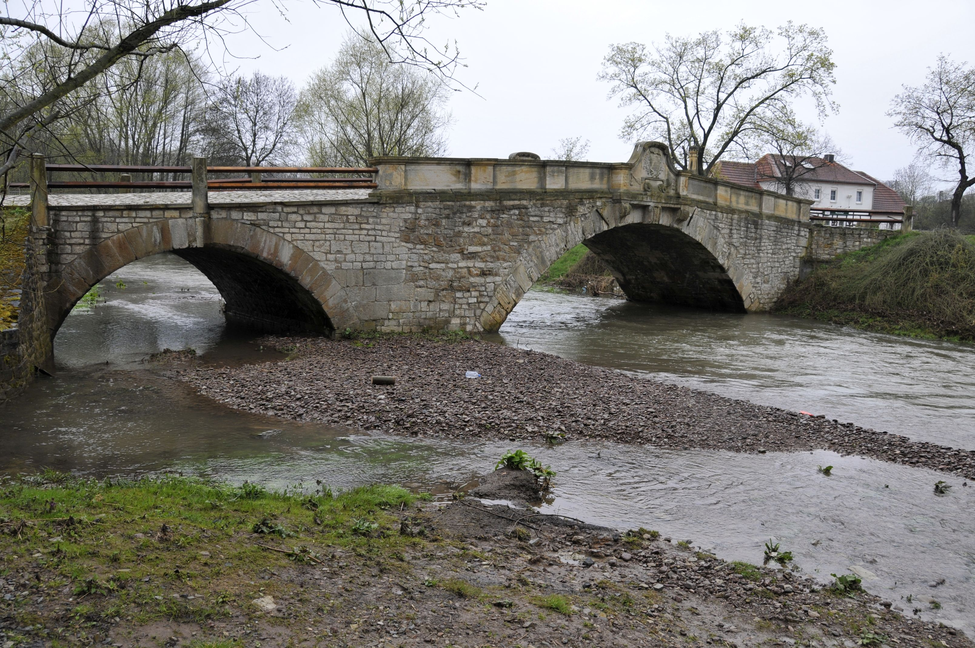 Marienthalbrücke aus Mündungssicht